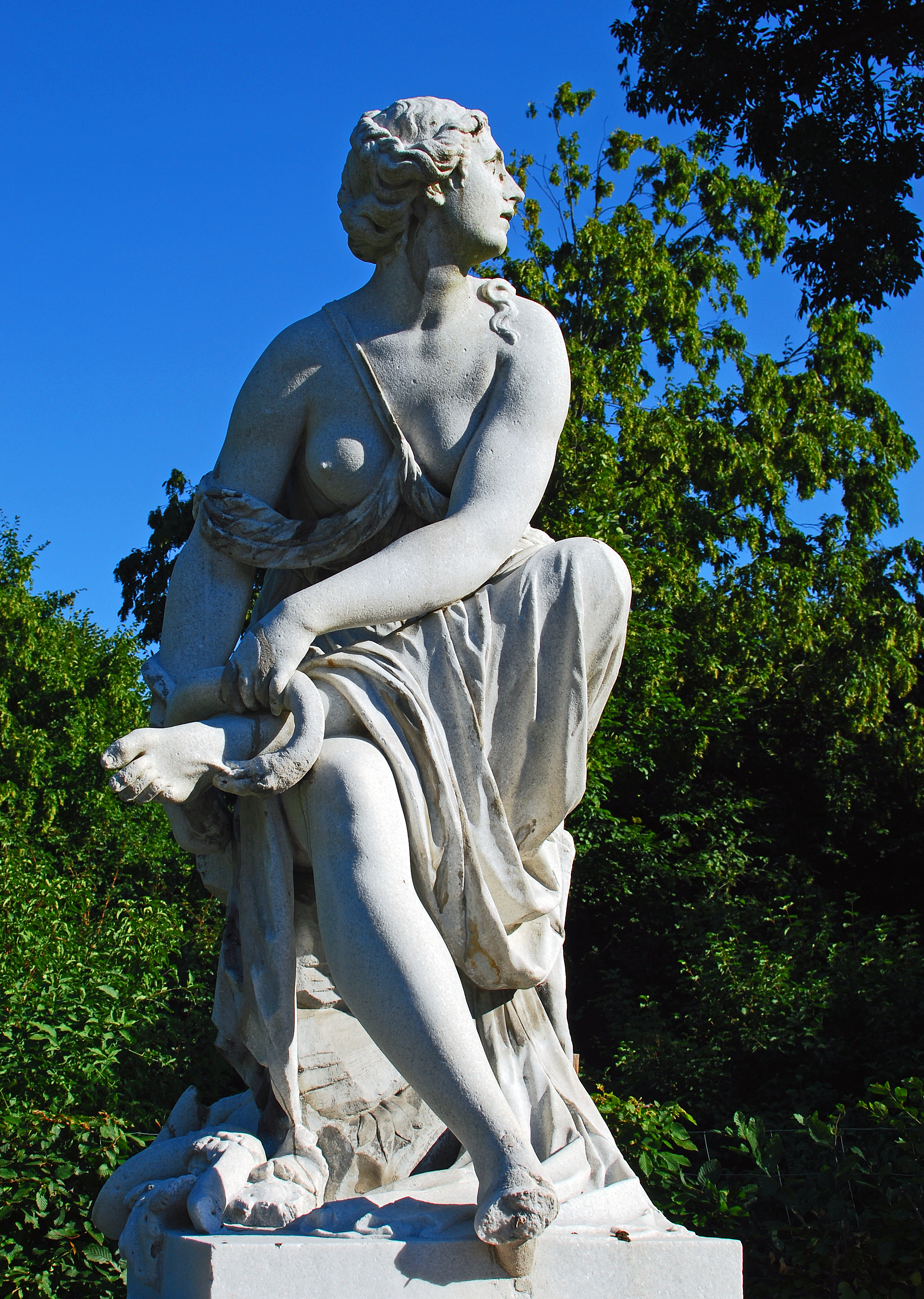 Skulptur im Schlosspark Schönbrunn